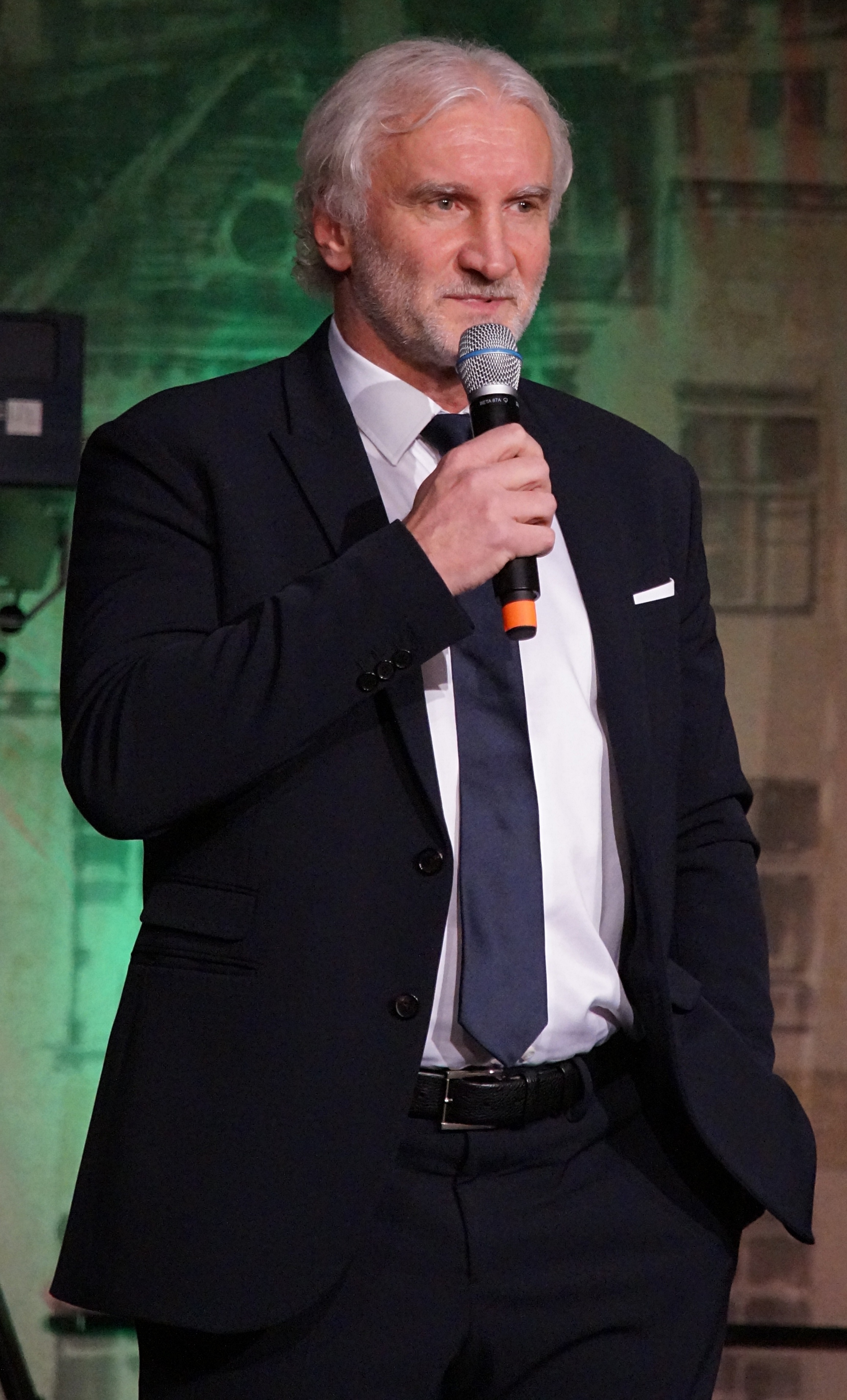 Rudi Völler bei der "Kölner Charity Sports Night", am 27.11.2016 im Kölner Dorint Hotel.